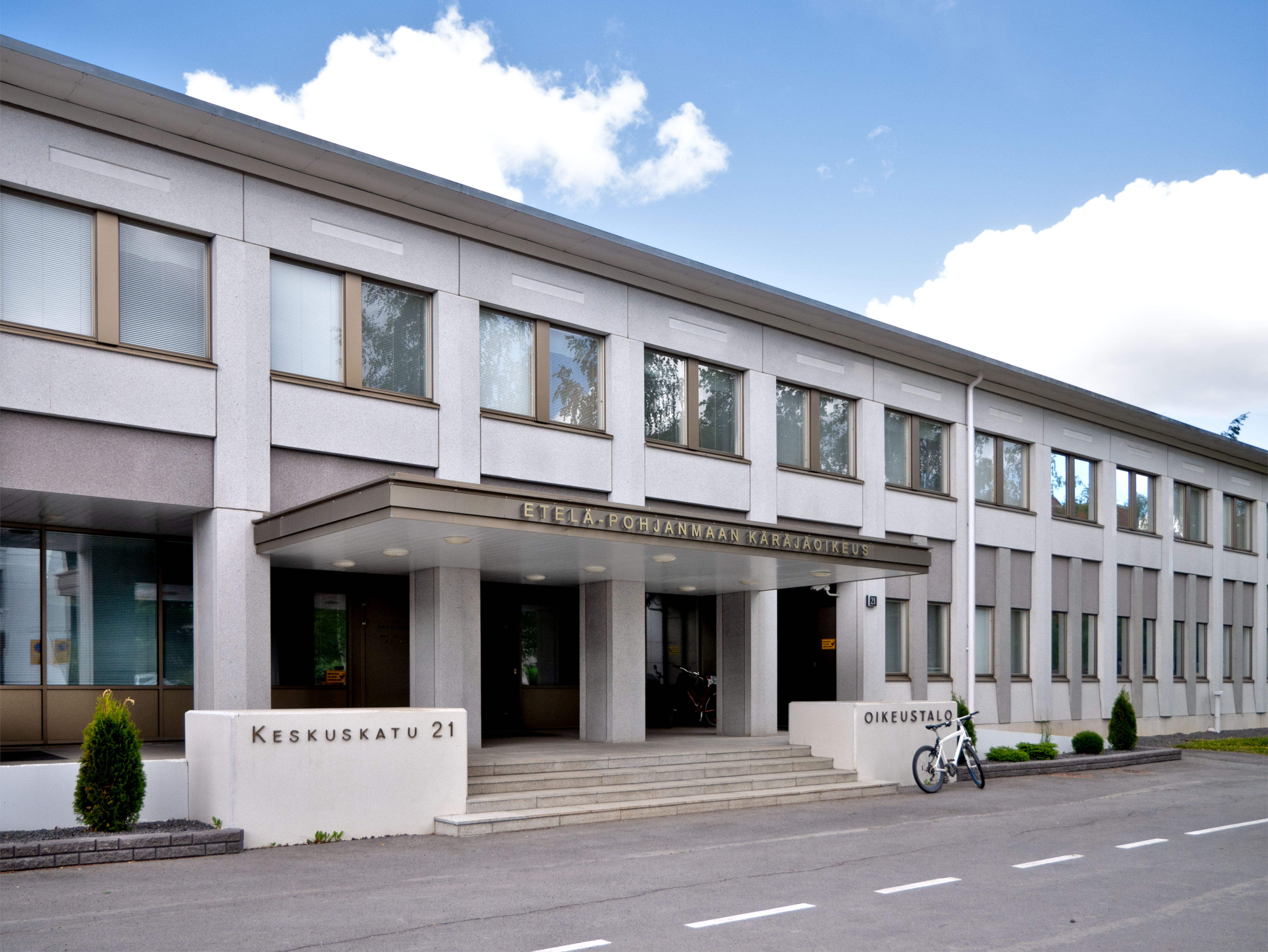 Seinäjoen oikeustalo.